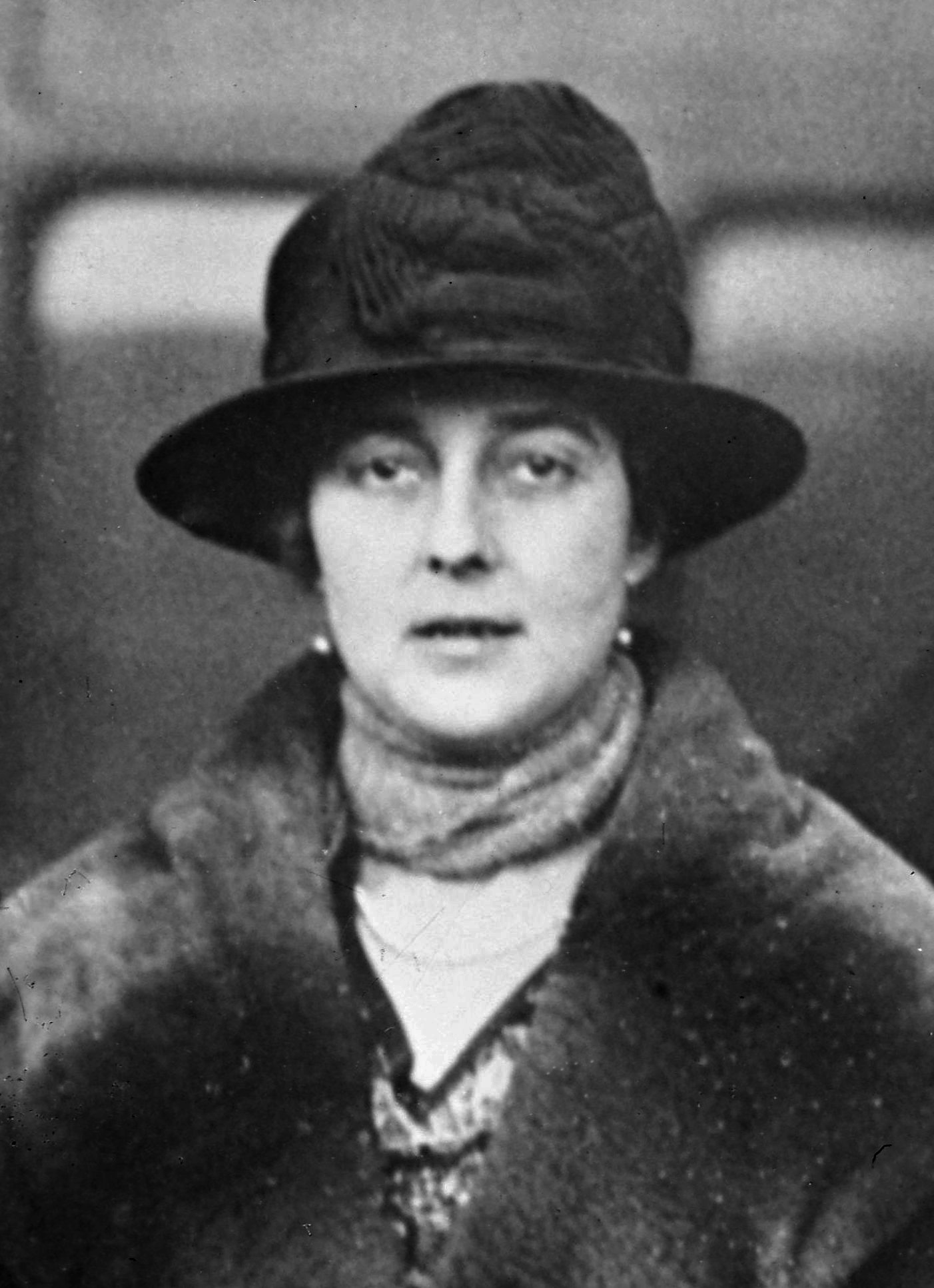 James Craig (1871-1940) et Cecil Marie Nowell Dering Tupper (1883-1960)